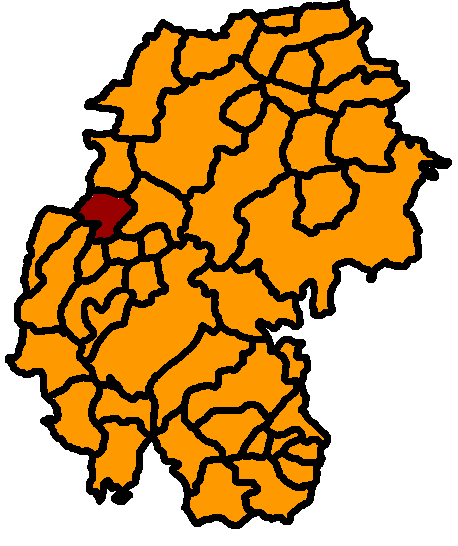 Liebenstein hervorgehoben, Ilm-Kreis